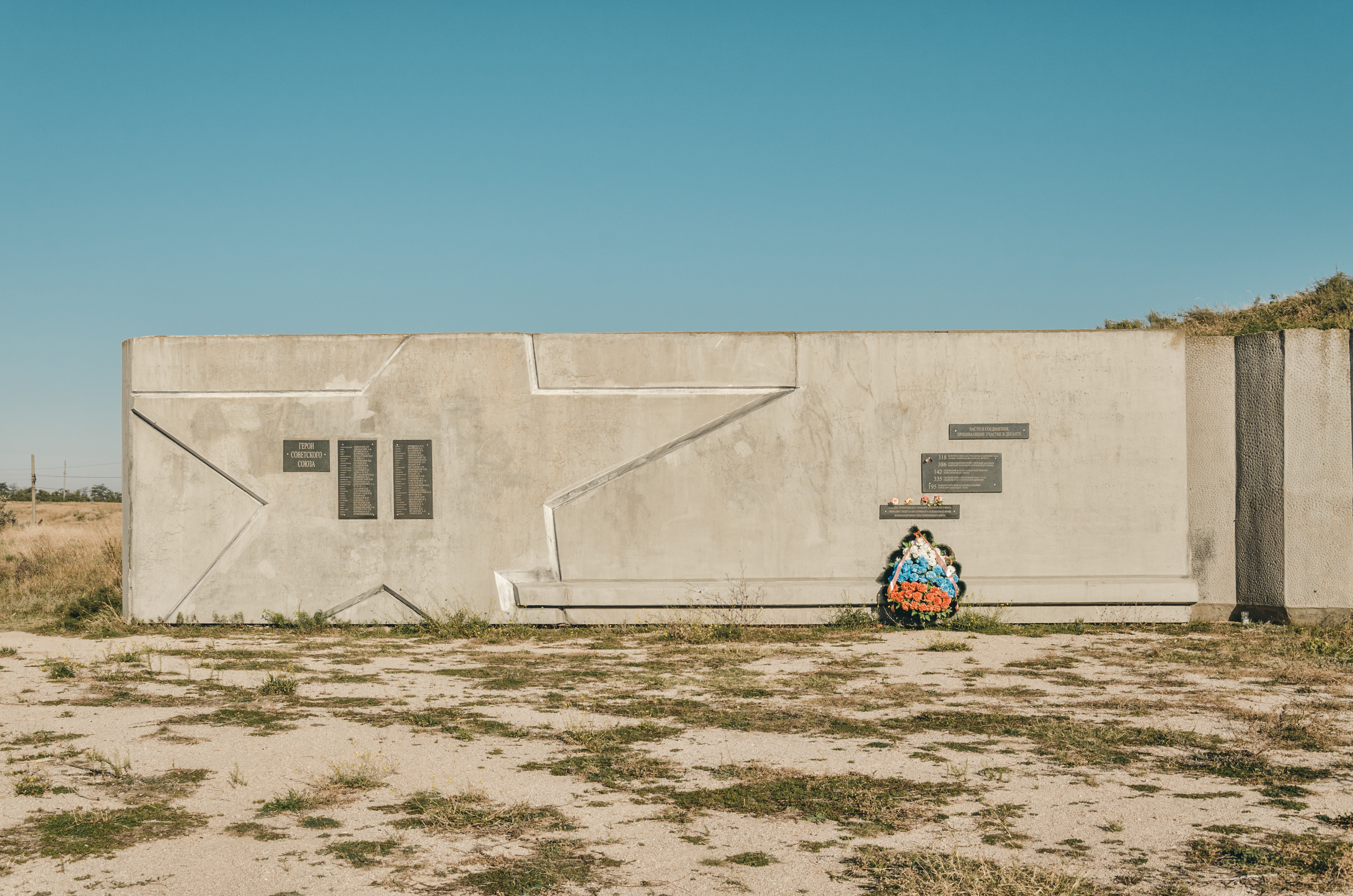 Мемориальный комплекс «Героям Эльтигенского десанта». Дата событий: 1943 г. Дата сооружения: 1985 г.: улица Галины Петровой, район Эльтиген, Керчь, Крым This object is located on the Crimean Peninsula and recognized as cultural heritage by Russia under the monument ID: 8230419000. The legal status of the Crimean region is currently disputed.